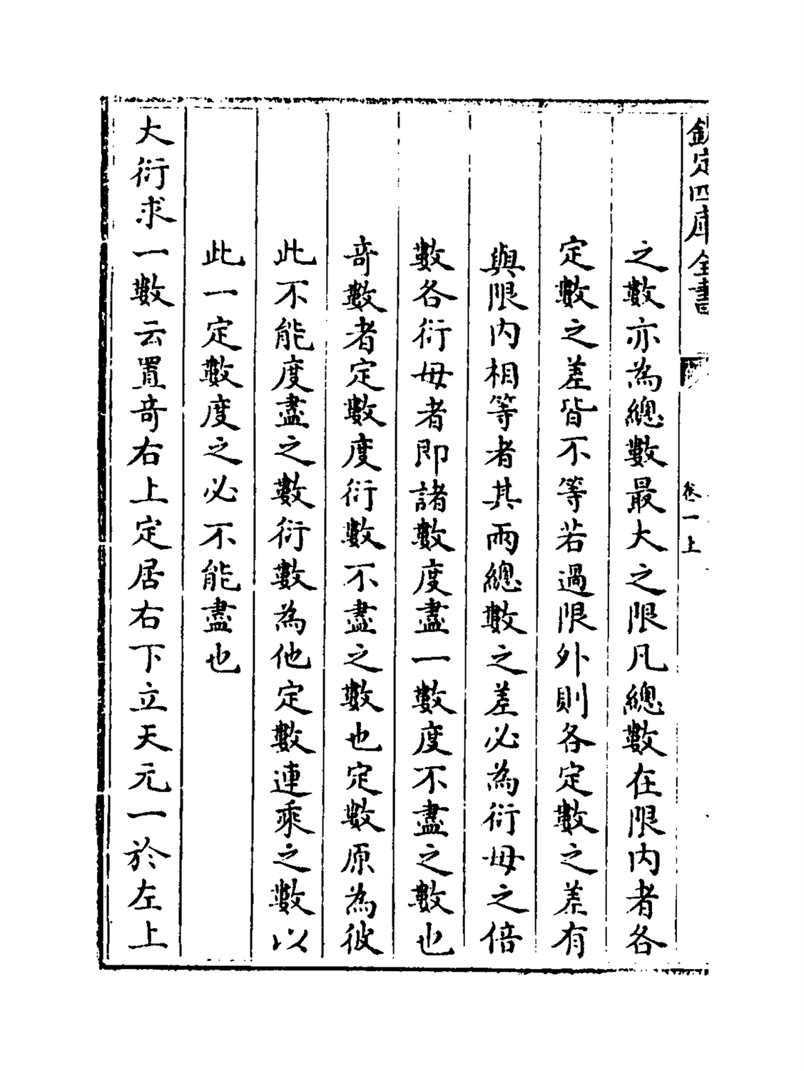 秦九韶大衍求一术